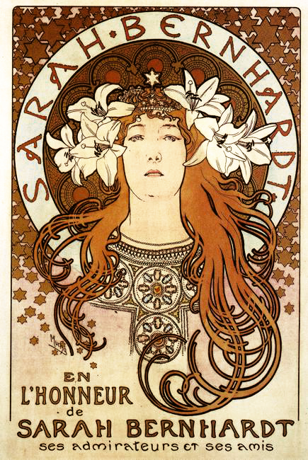 Sarah_Bernhardt_Mucha.jpg: Афіша з портретом Сари Бернар. Кольорова літографія.